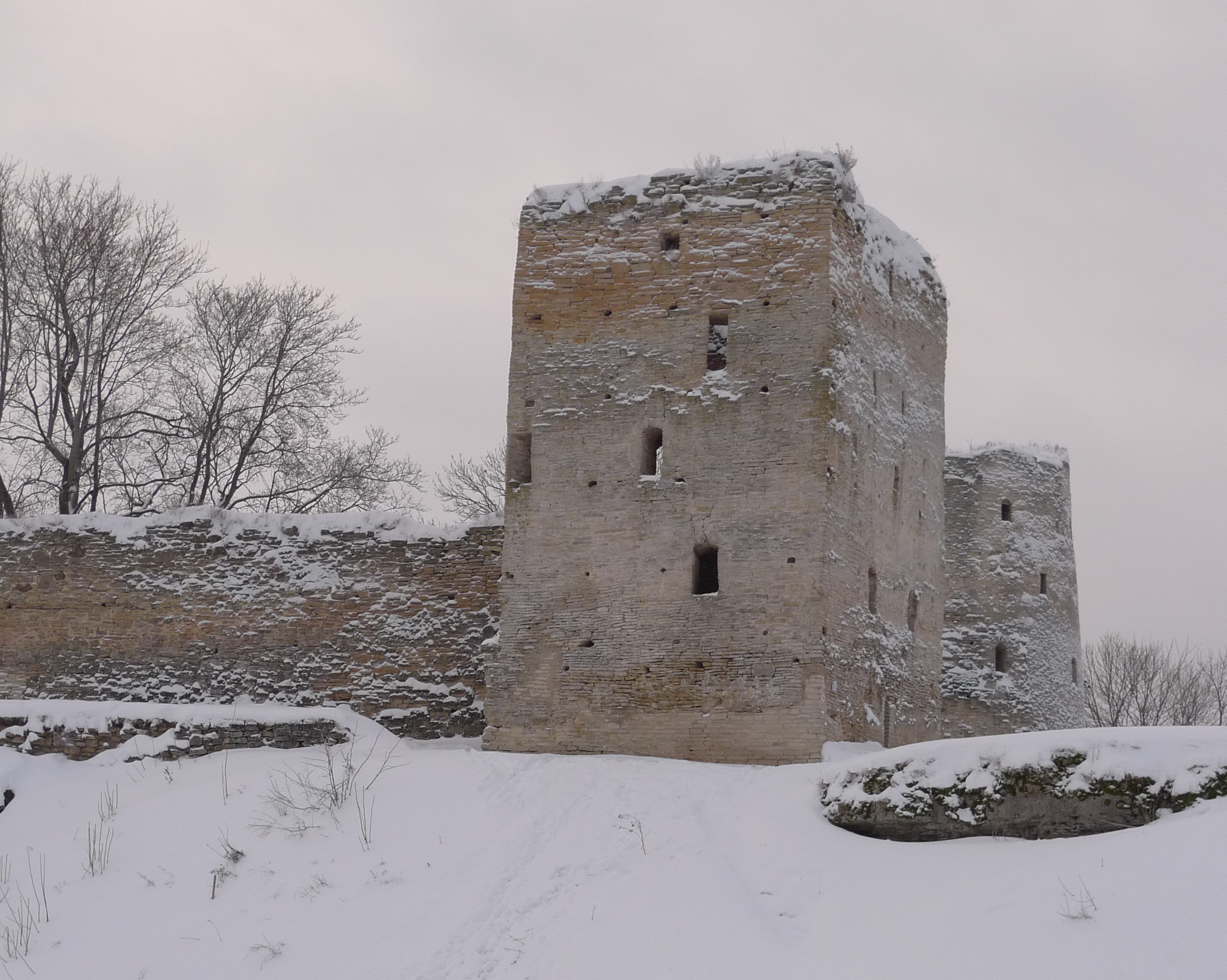 Башня Таловская (Псковская область, Печоры, деревня Изборск)